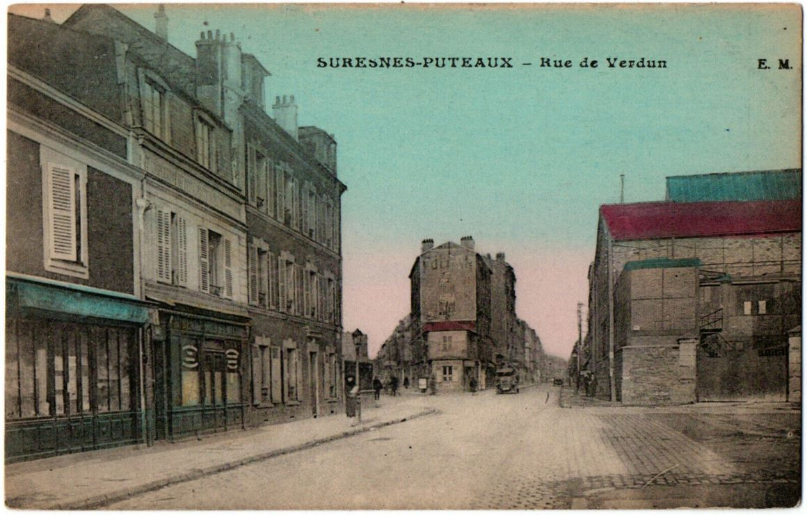 Suresnes.Puteaux.Rue de Verdun.Colorisée